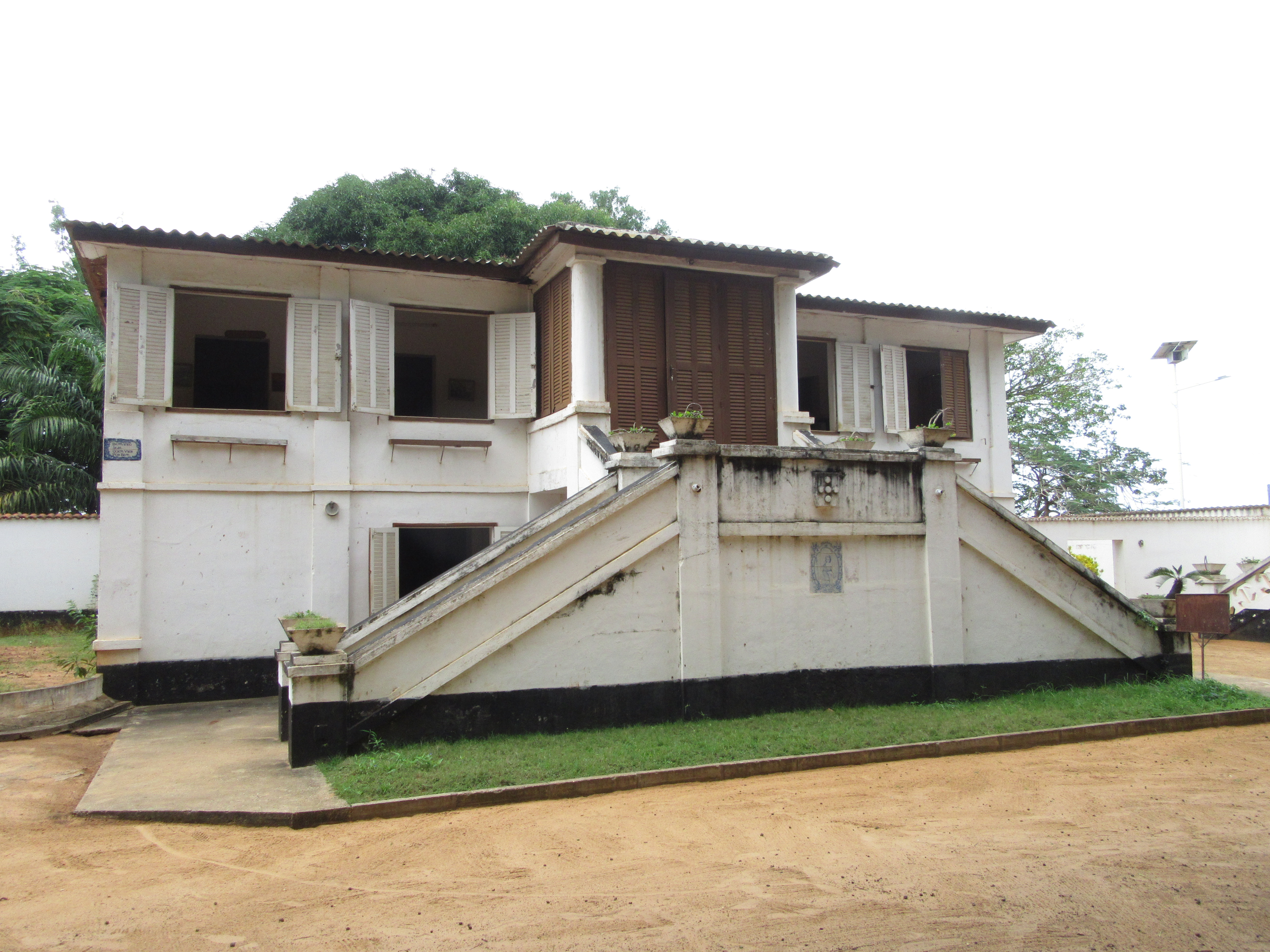 Le Fort Portugais Bâti en 1721, le Fort Portugais de Ouidah portait le nom de Saint-Jean-Baptiste d’Ajuda. Ce fort ressemble plus aujourd’hui à une maison coloniale aux murs blancs avec toutefois la présence d’un petit azulejo qui rappelle la Portugal. Dans la cour on peut admirer de magnifiques manguiers et un frangipanier qui doivent avoir de nombreuses histoires à raconter. On apprends qu’il y avait cinq (5) forts à Ouidah : les forts portugais, anglais, français, danois et hollandais. Ils ont tous été brûlés en 1961 après l’Indépendance du Bénin, à l’époque de Salazar. Le fort portugais est resté débout mais les archives ont toutes été détruites. En 1967, la transformation du fort en musée a été opérée par les portugais eux même. Ils ont ainsi rapportés des objets et documents. Aujourd’hui, le fort couvre la surface d’un hectare environ et entre ses murs se trouvent une résidence des représentants officiels du Portugal, une chapelle, une garnison et des casernes. Le musée accueille d’importantes collections accumulées à la suite de plusieurs fouilles archéologiques dans les zones de Savi et de Ouidah. Wikidata has entry Q60852840 with data related to this item.